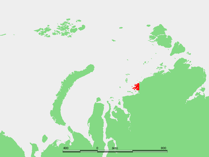 Nordensjelda Islands